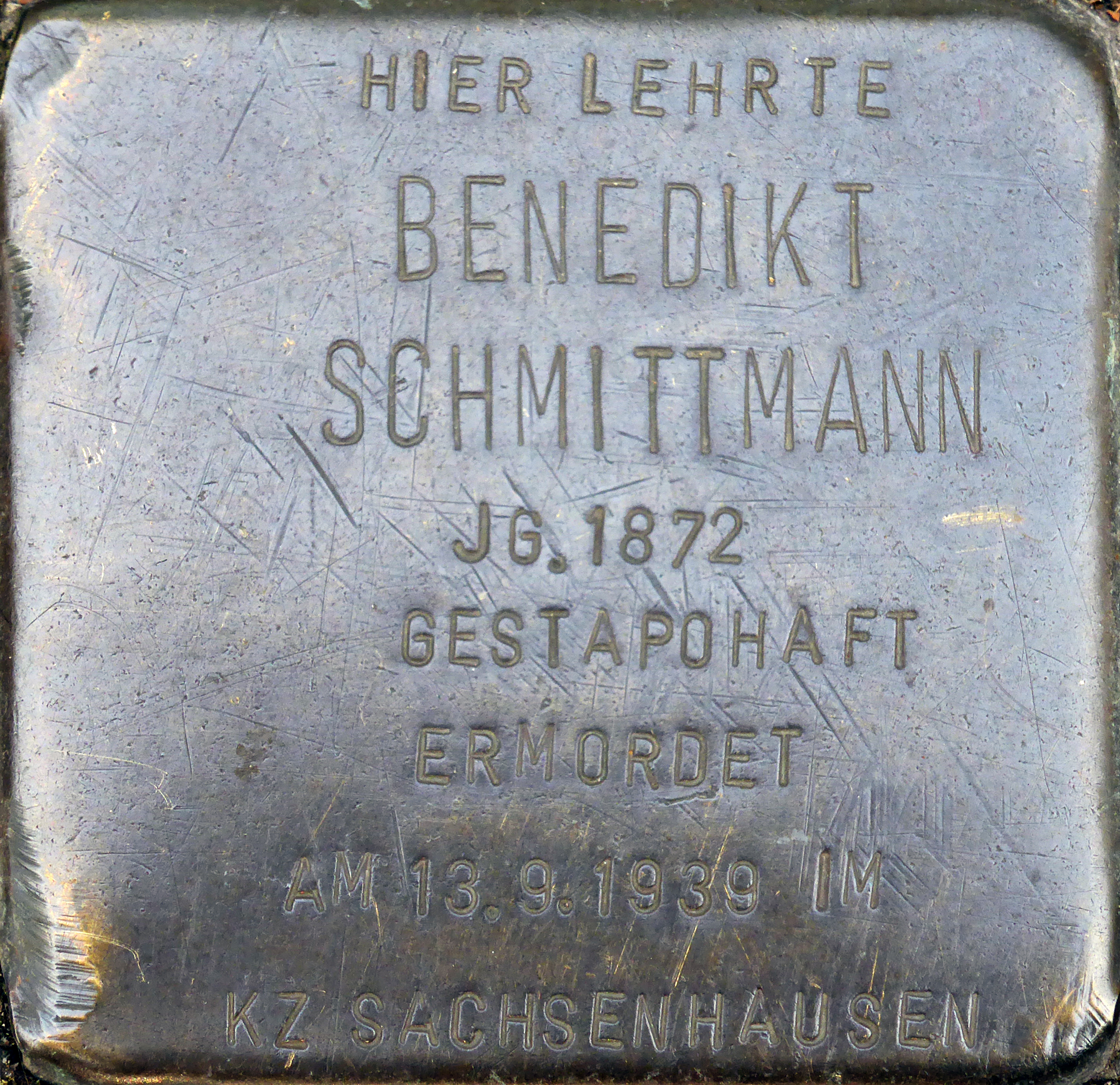 Stolperstein: Benedikt Schmittmann, Uni-Vorplatz, Köln